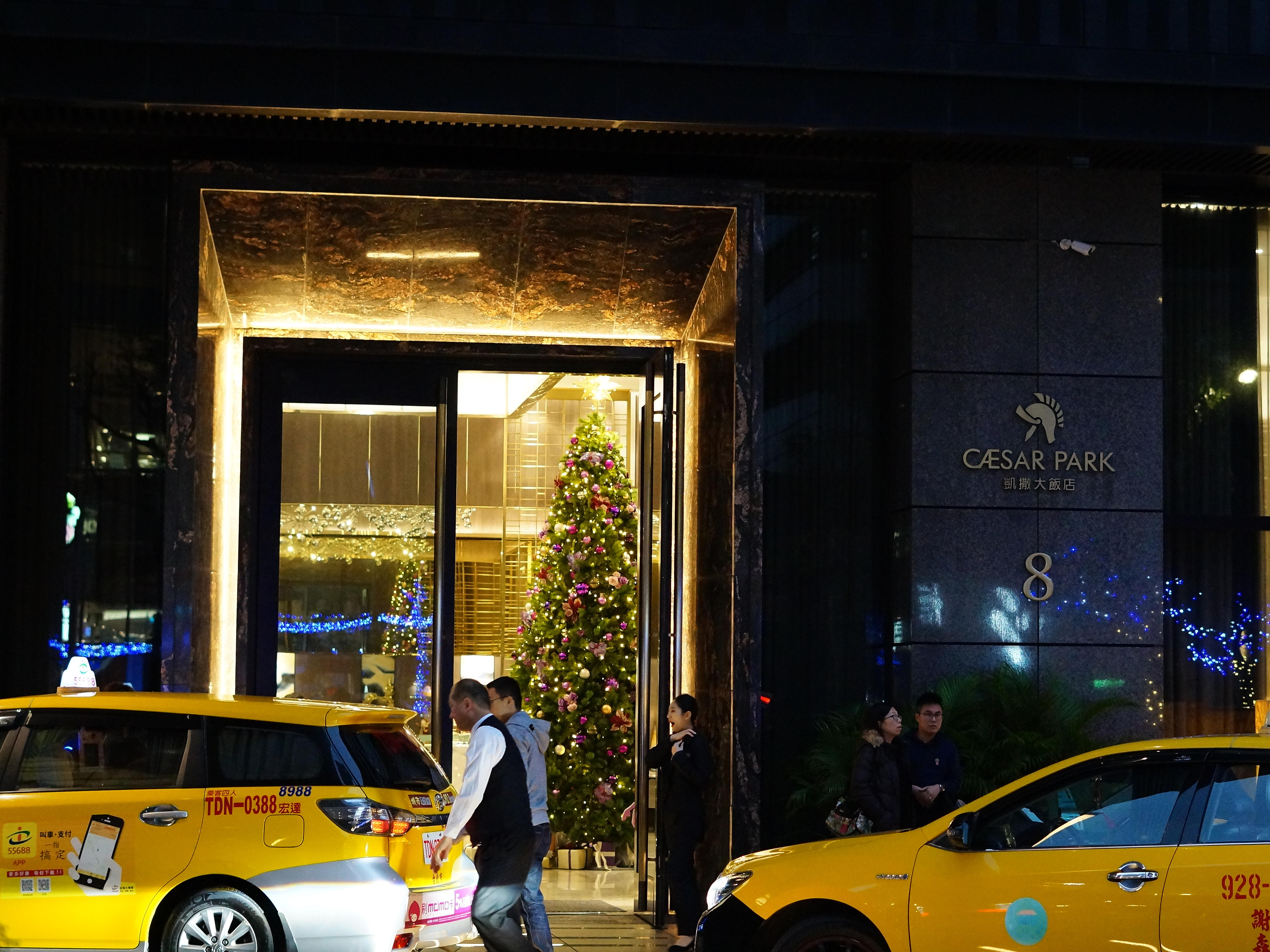 板橋凱撒大飯店大門夜景。